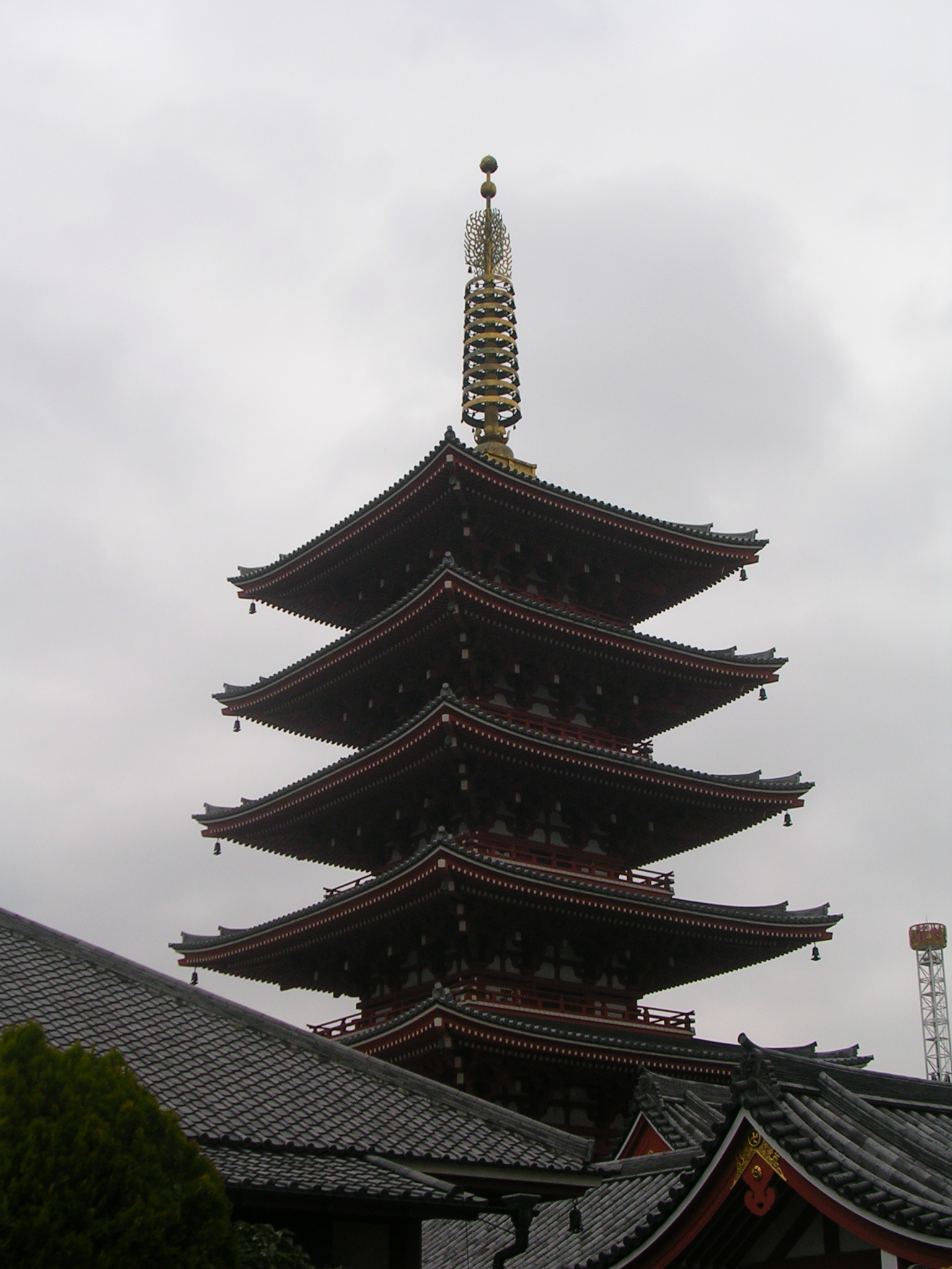 The Five-storied Pagoda at Senso-ji, Asakusa, Taito-ku, Tokyo